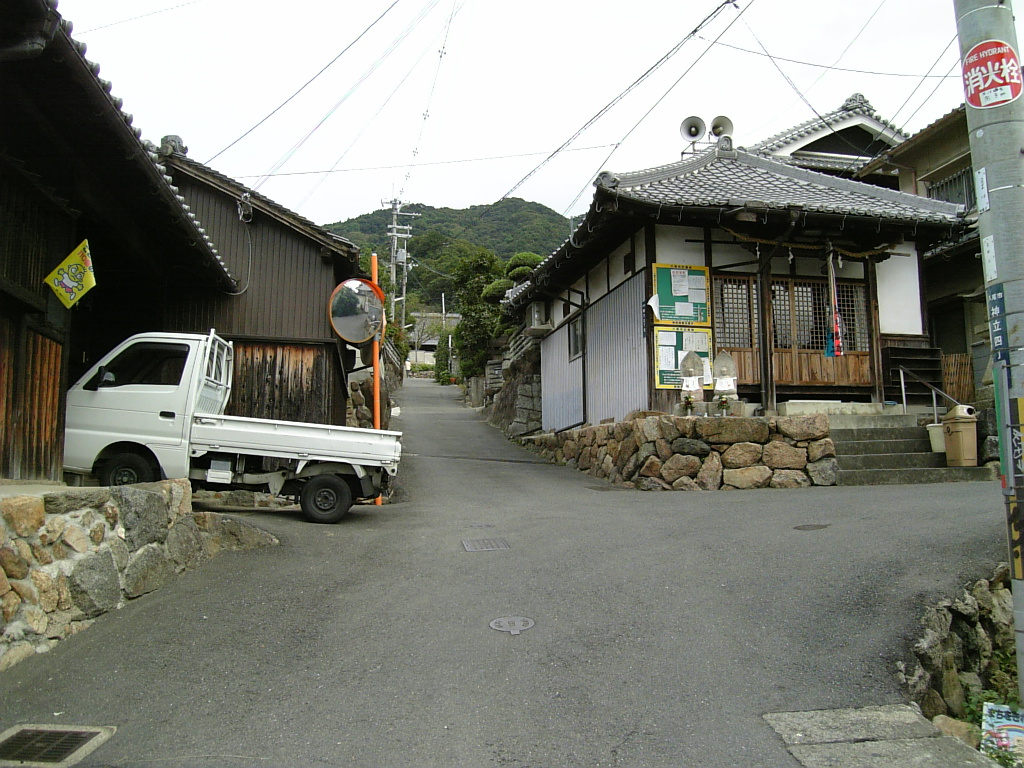 十三街道（大阪府八尾市神立）